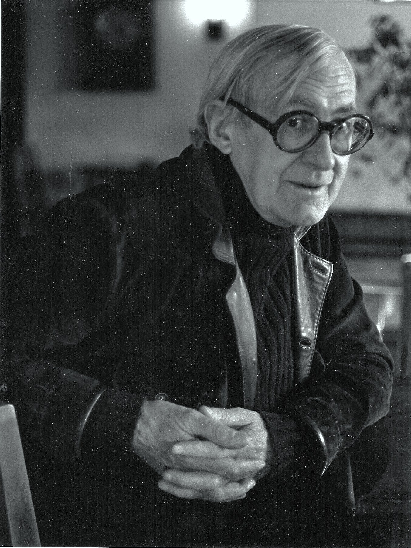 Portrait du peintre suisse Paul Monnier (1907-1982).